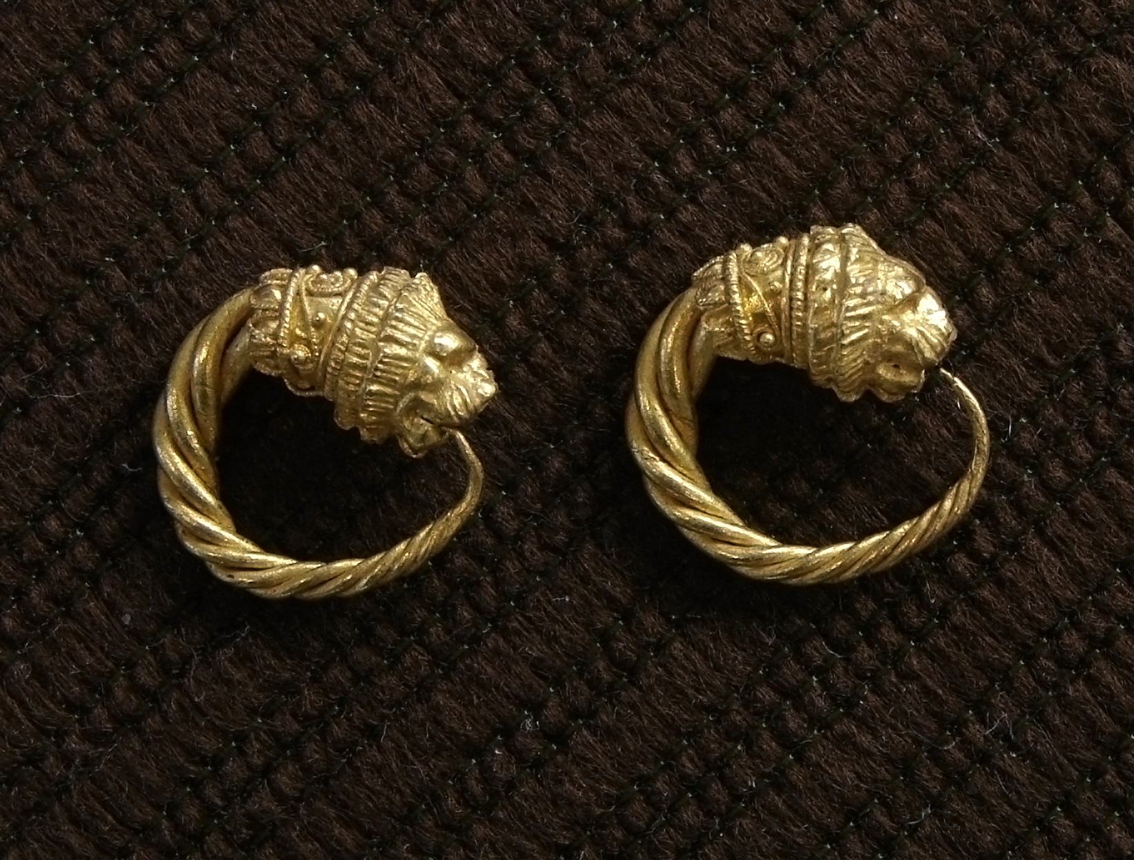 Boucles d'oreilles gallo-romaines en or, en forme de têtes de lion. Musée de Laon.